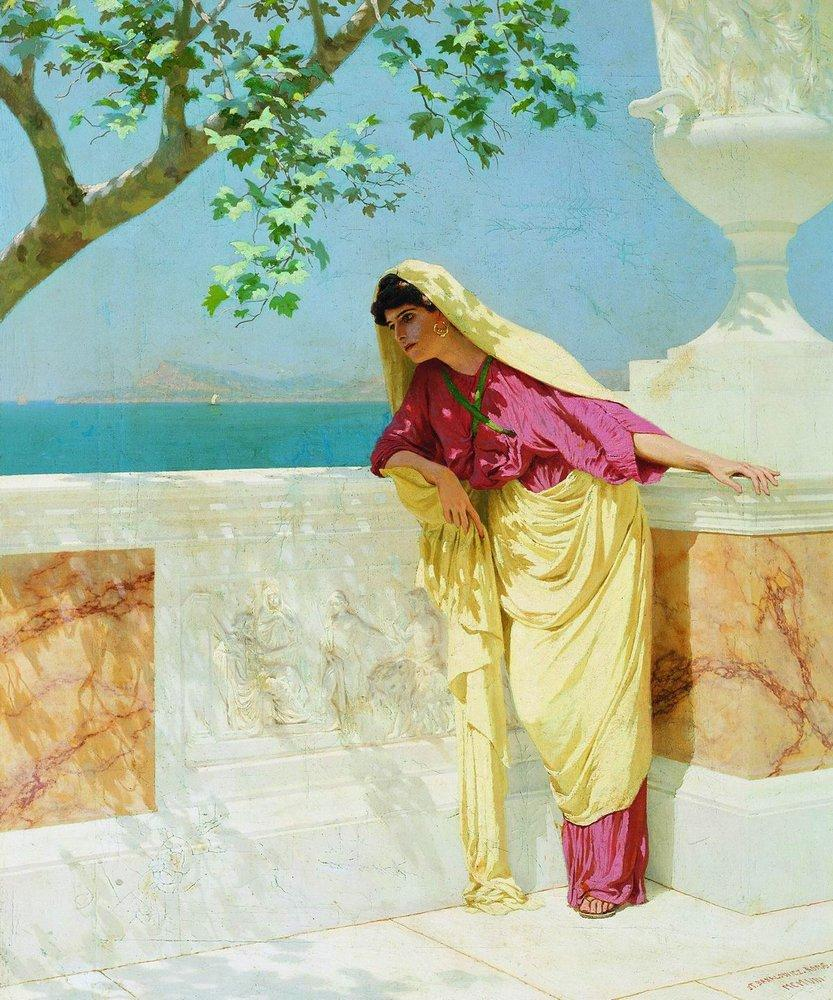 Степан Бакалович. Гречанка у моря.